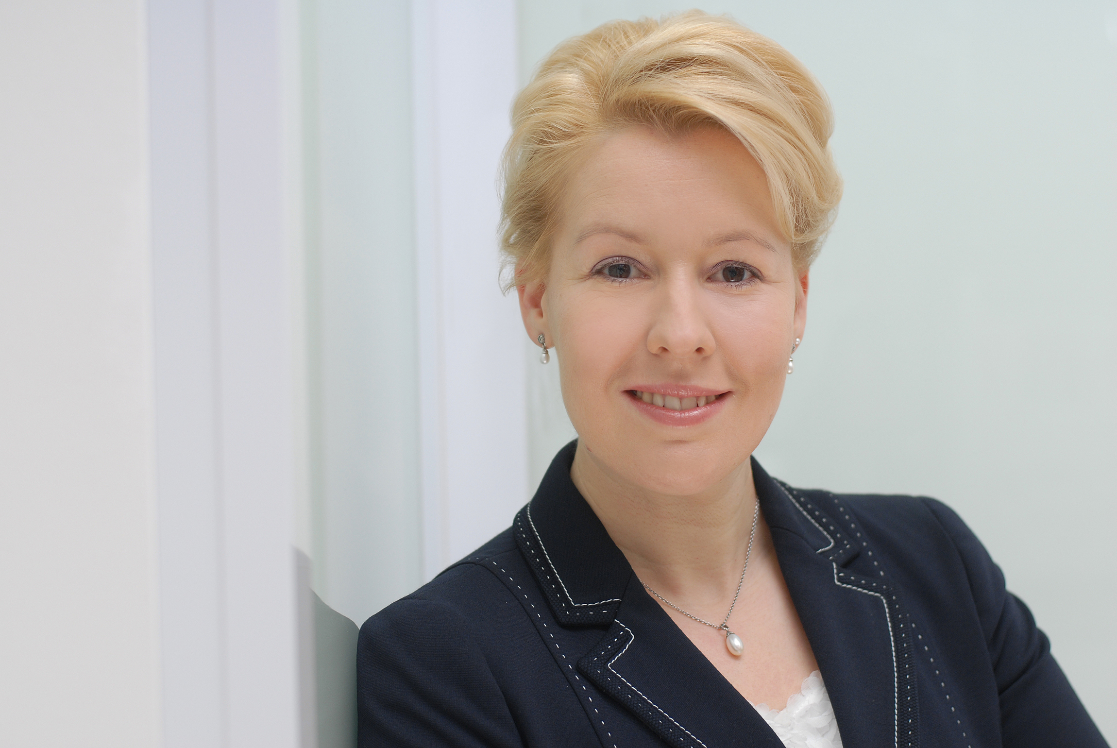 Pressefoto von Franziska Giffey